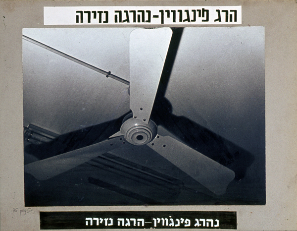 Painting